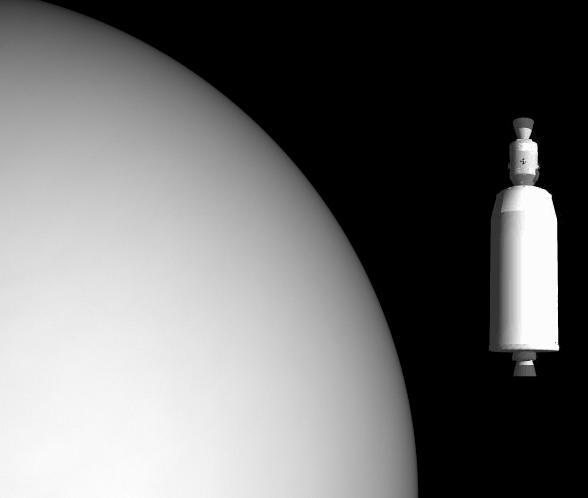 Empleo de fondo un fragmento de Image:Venus 2 Approach Image.jpg, imagen en Dominio Público (public domain). La ilustración pretende representar el proyecto de la NASA descrito en el artículo de la wikipedia anglohablante Manned Venus Flyby.